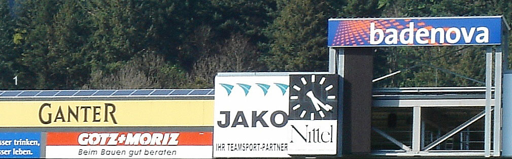 Solarzellen (1) auf dem Badenova-Stadion in Freiburg im Breisgau